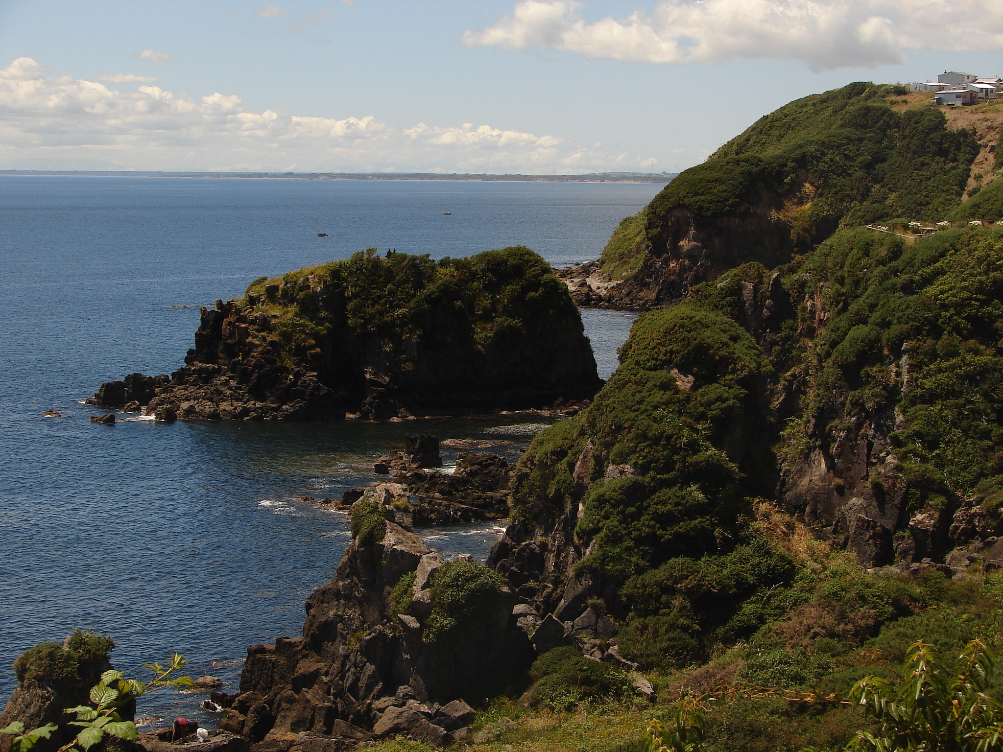 Ciudad de Ancud, Chile.